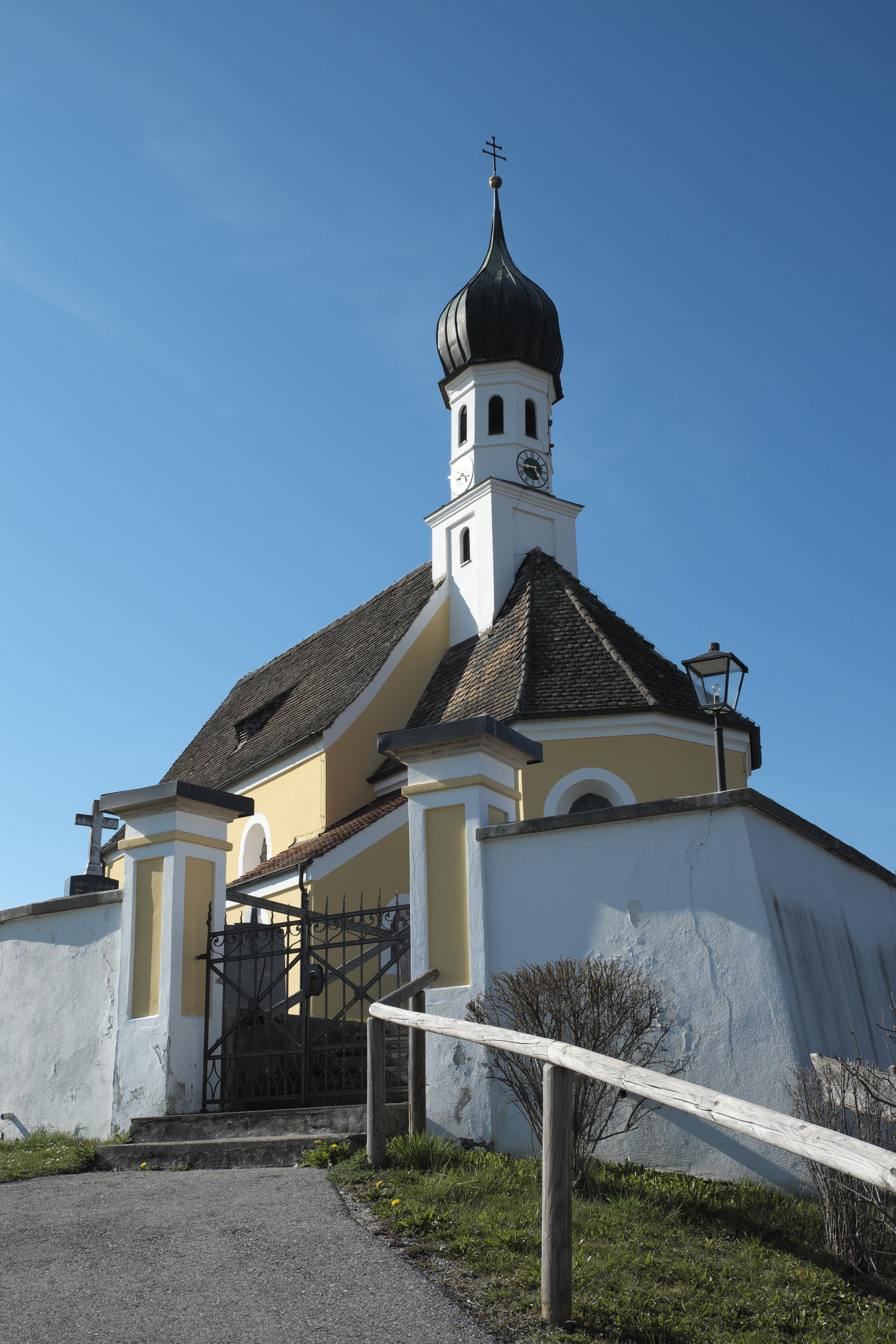 Filialkirche Mariä Himmelfahrt in Jenhausen, einem Ortsteil von Seeshaupt im Landkreis Weilheim-Schongau (Bayern/Deutschland)